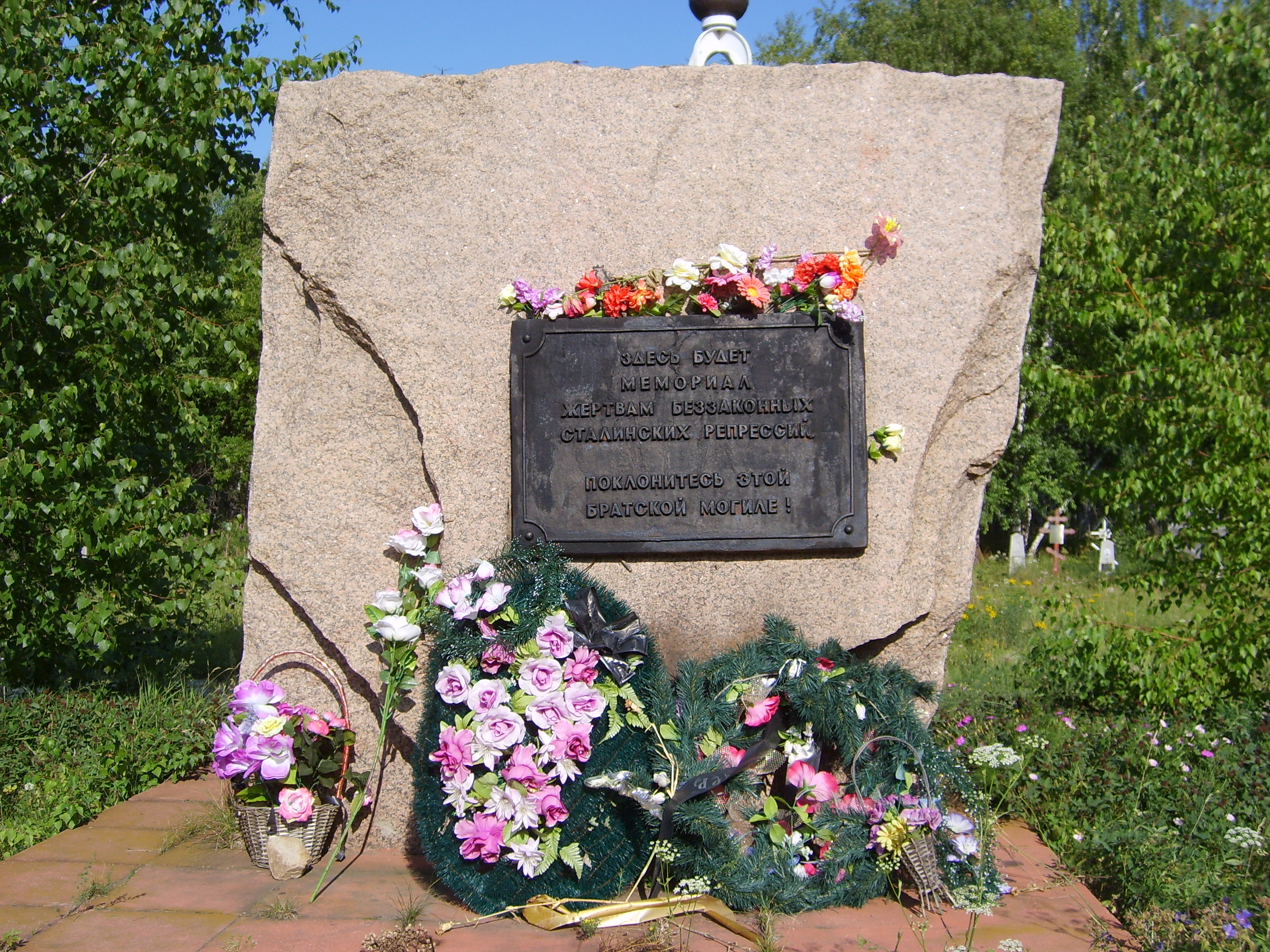 Золотая Гора